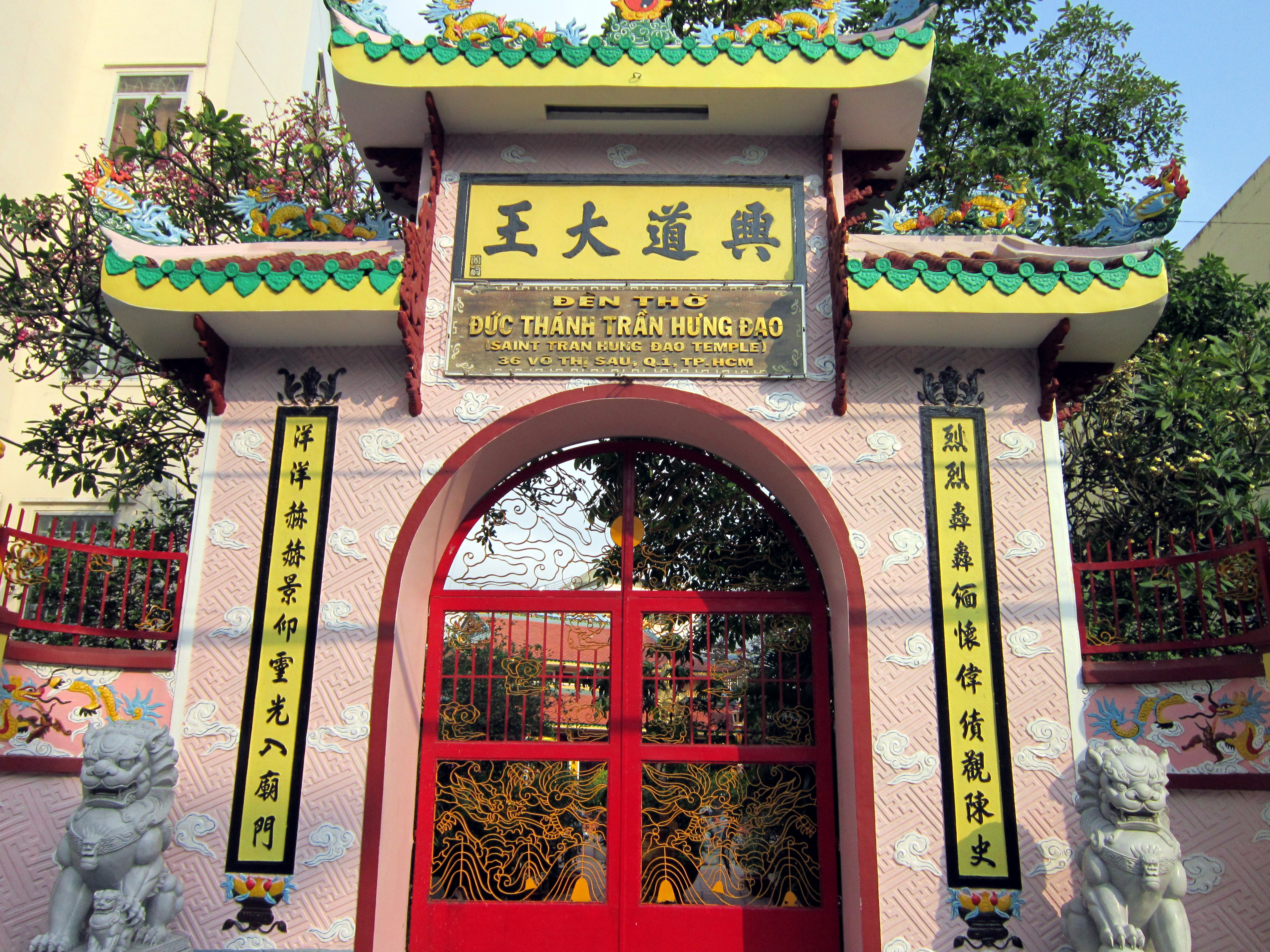 Đền Đức Thánh Trần Hưng Đạo khởi công xây dựng vào ngày 28 tháng 7 năm 1957, hoàn thành vào ngày 11 tháng 7 năm 1958; hiện ở số 36 đường Võ Thị Sáu, quận 1, thành phố Hồ Chí Minh.